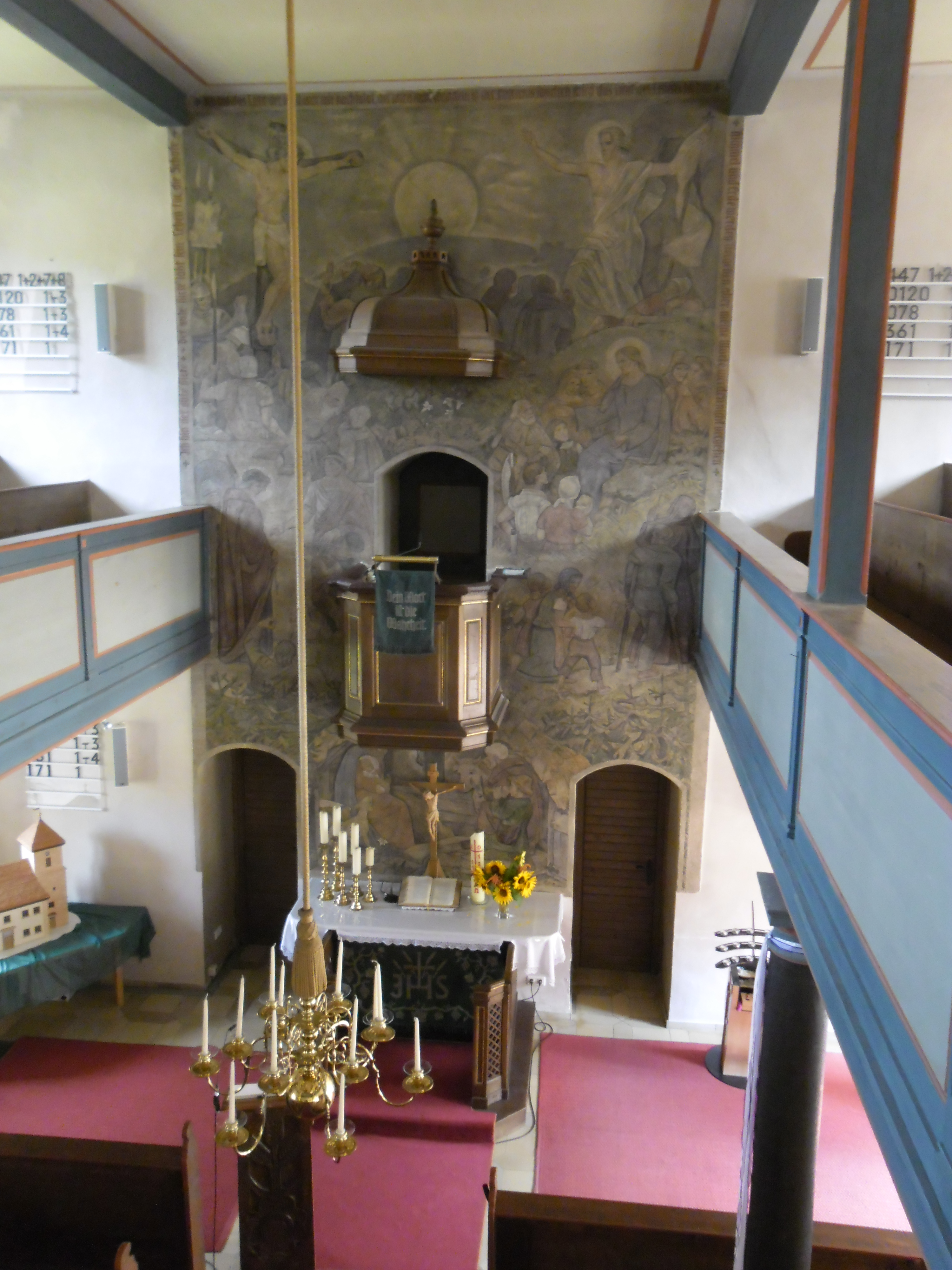 Innenansicht St. Bartholomäus Kammerstein 05